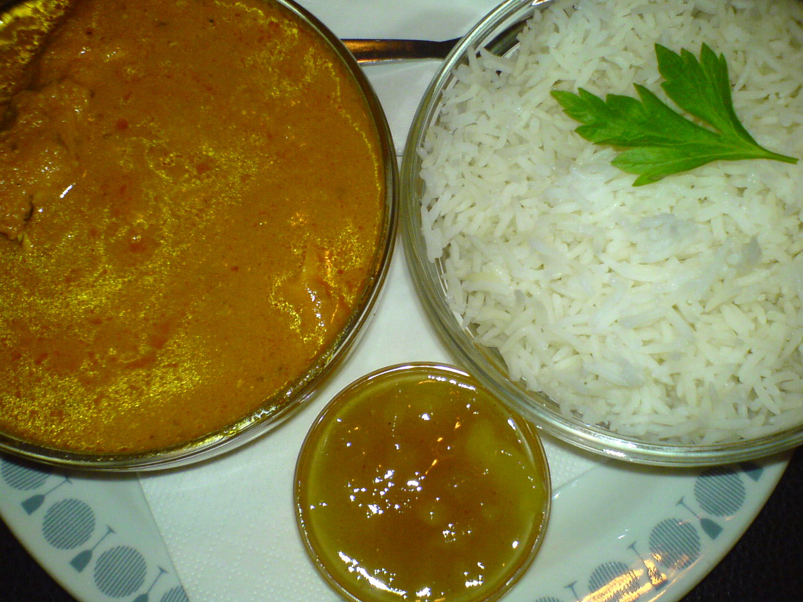 Chicken masala